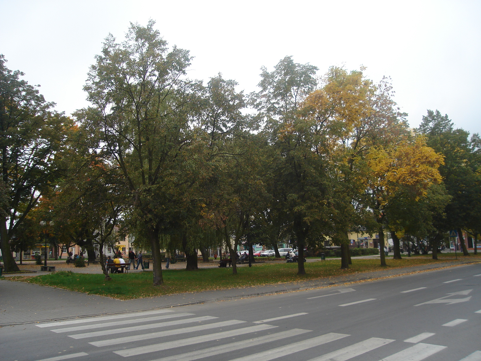 Plac Wolności dawnej Rynek we Włoszczowie